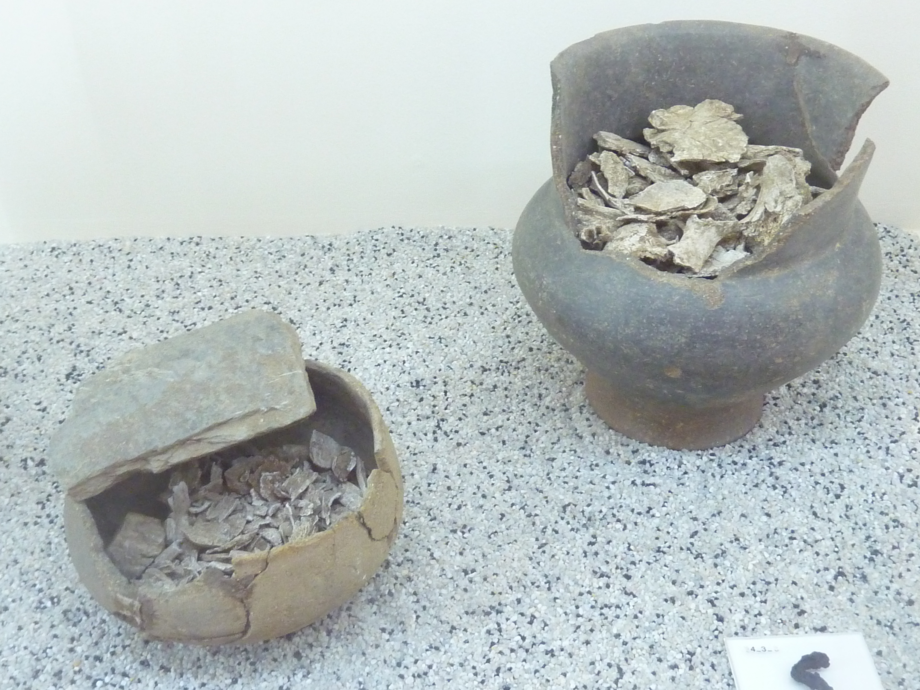 Deux urnes cinéraires contenant les ossements d'un défunt, la plus petite étant couverte d'une plaque de schiste (Nécropole protohistorique Boquidet à Sérent, Musée d'histoire et d'archéologie de Vannes)